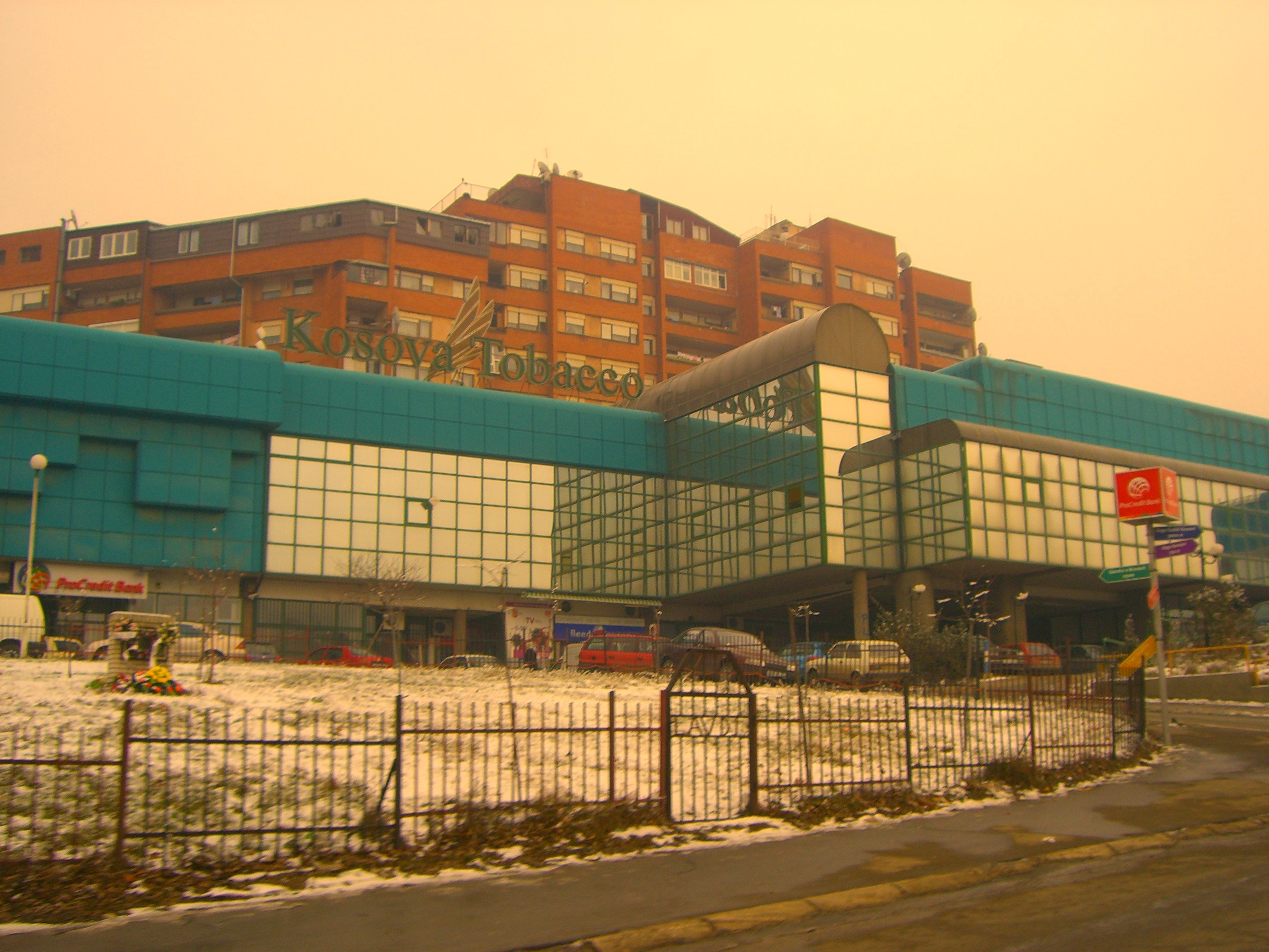 Shopping mall "Bregu i Diellit".